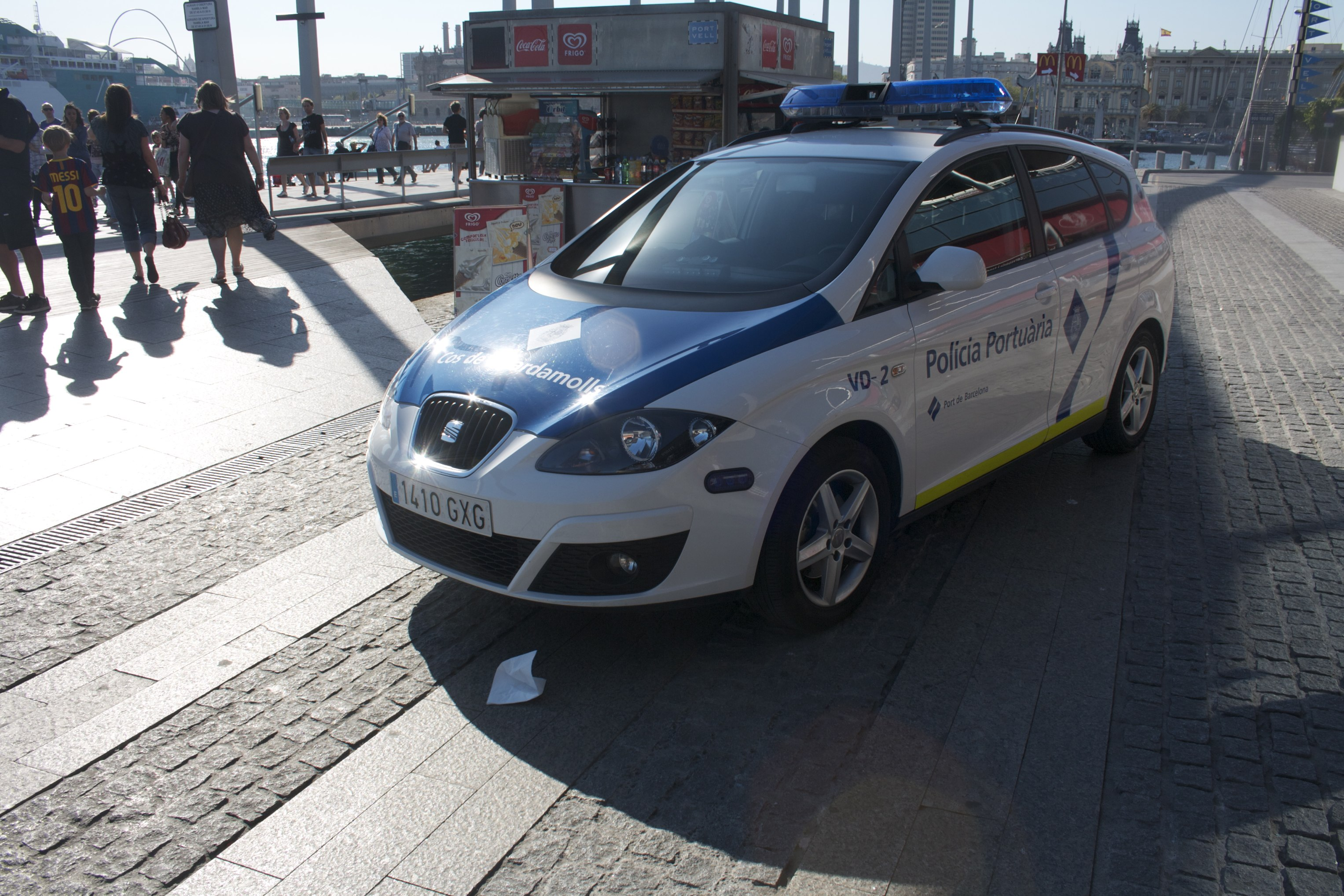 SEAT Altea XL facelift port police car